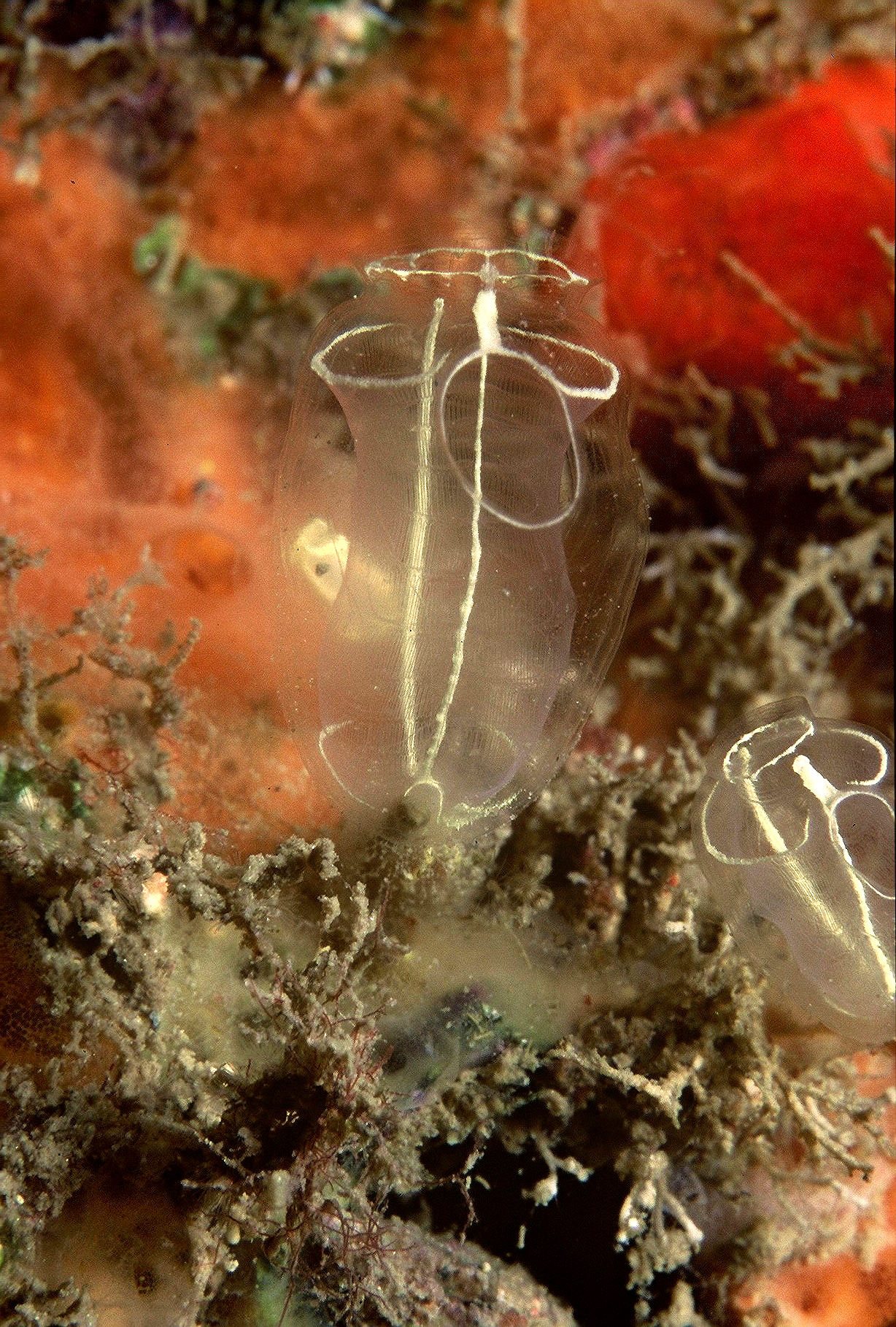 Clavelina lepadiformis La corbeille branchiale servant d'une part à oxygéner l'ascidie mais aussi à filtrer les particules pour l'alimentation de l'ascidie.